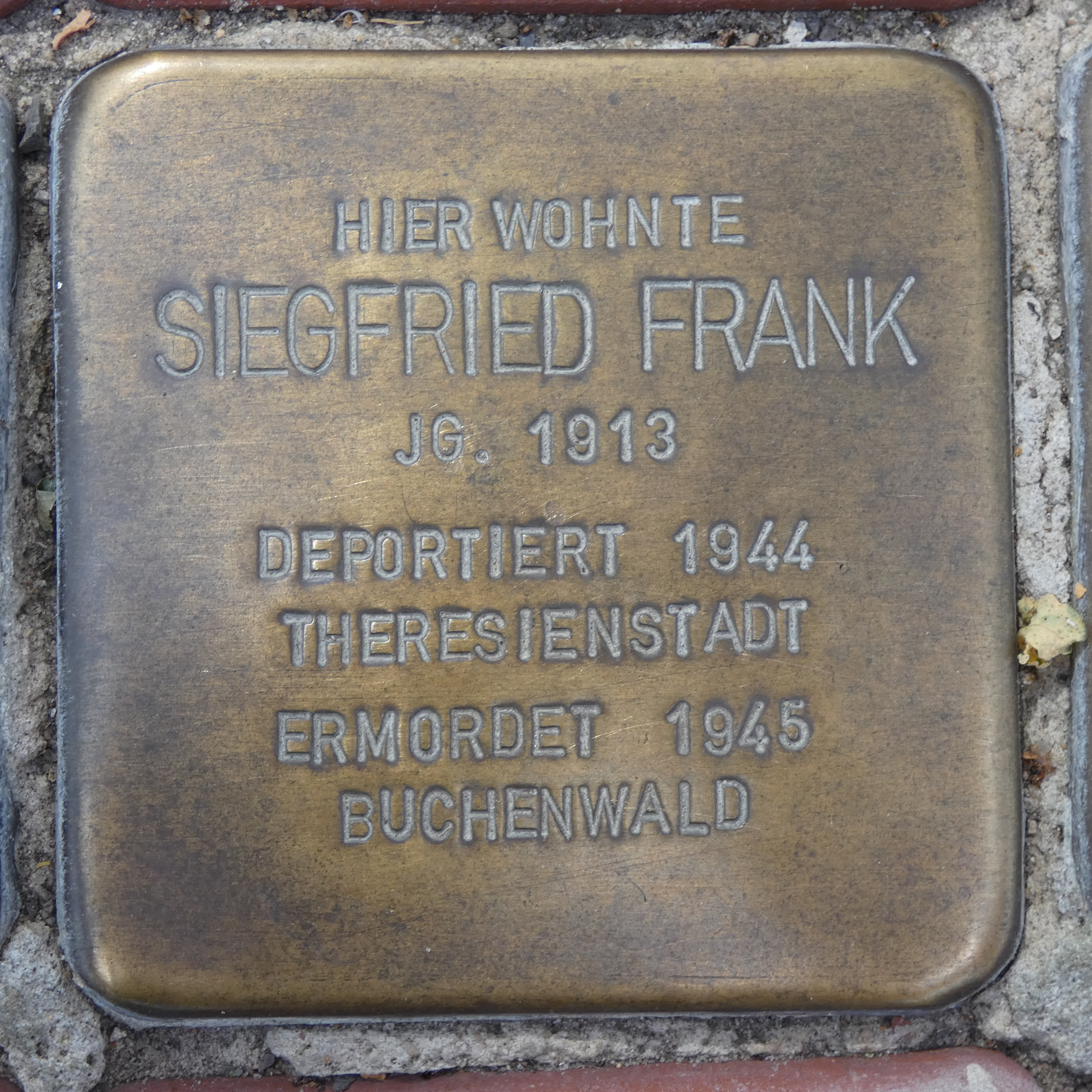 Hier wohnte Siegfried Frank, Jg. 1913, deportiert 1944, Theresienstadt, ermordet 1945 in Buchenwald